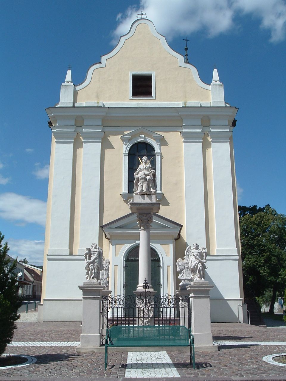 The Roman Catholic Church Rechnitz, Burgenland, Austria